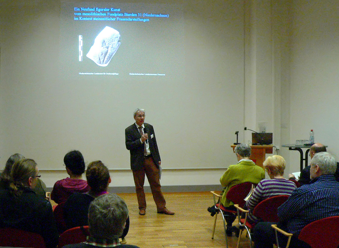 Der Prähistoriker Thomas Terberger beim Workshop „Neufund figuraler Kunst vom mesolithischen Fundplatz Bierden 31 im Kontext steinzeitlicher Frauendarstellungen“, u.a. zur Venus von Bierden, im Niedersächsischen Landesmuseum